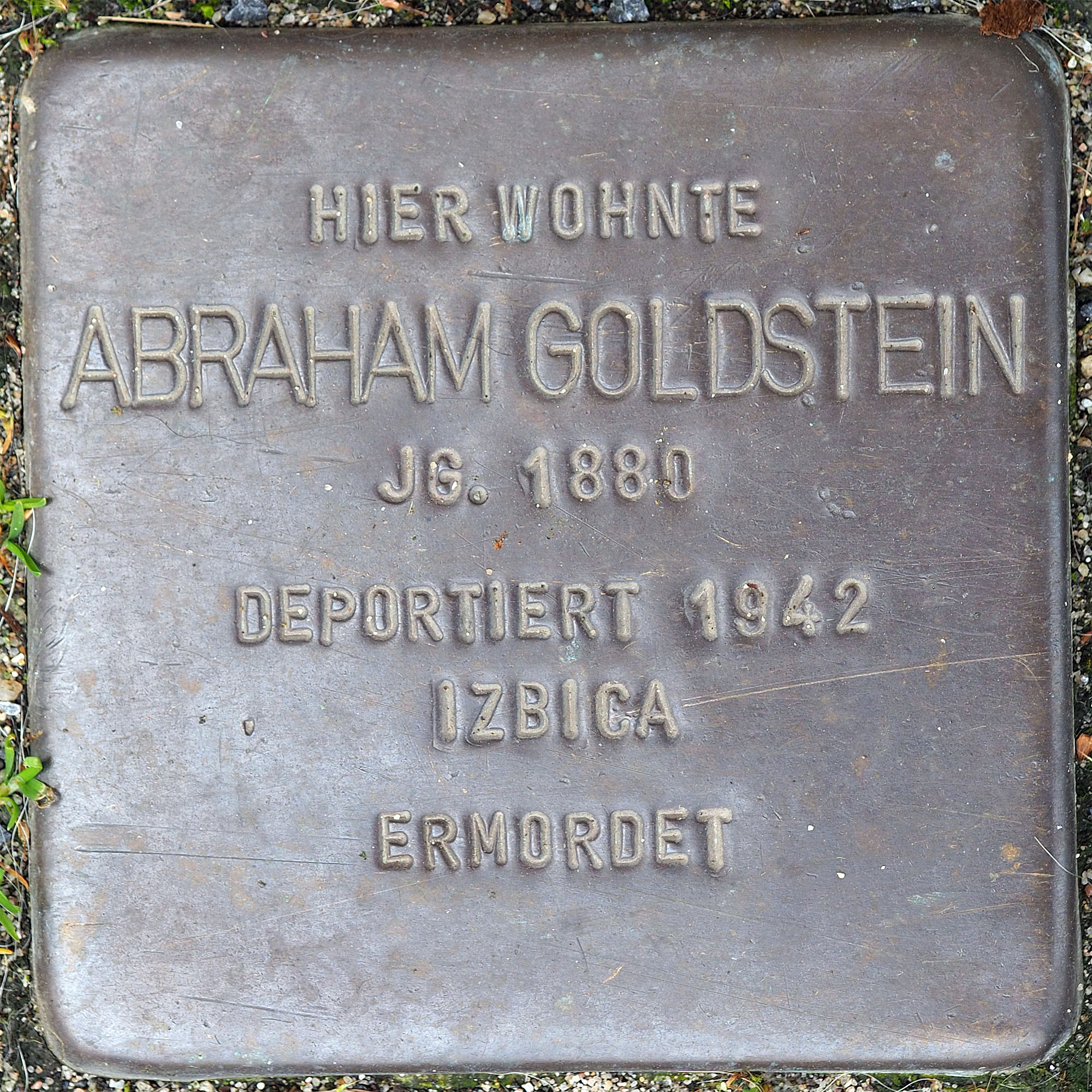 Stolpersteine MG: Goldstein, Abraham